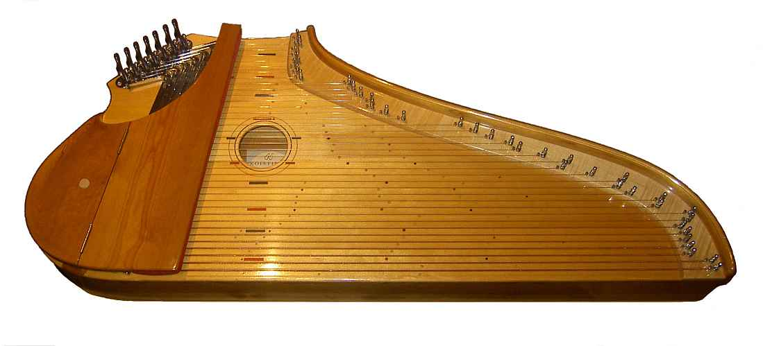 Große Konzertkantele